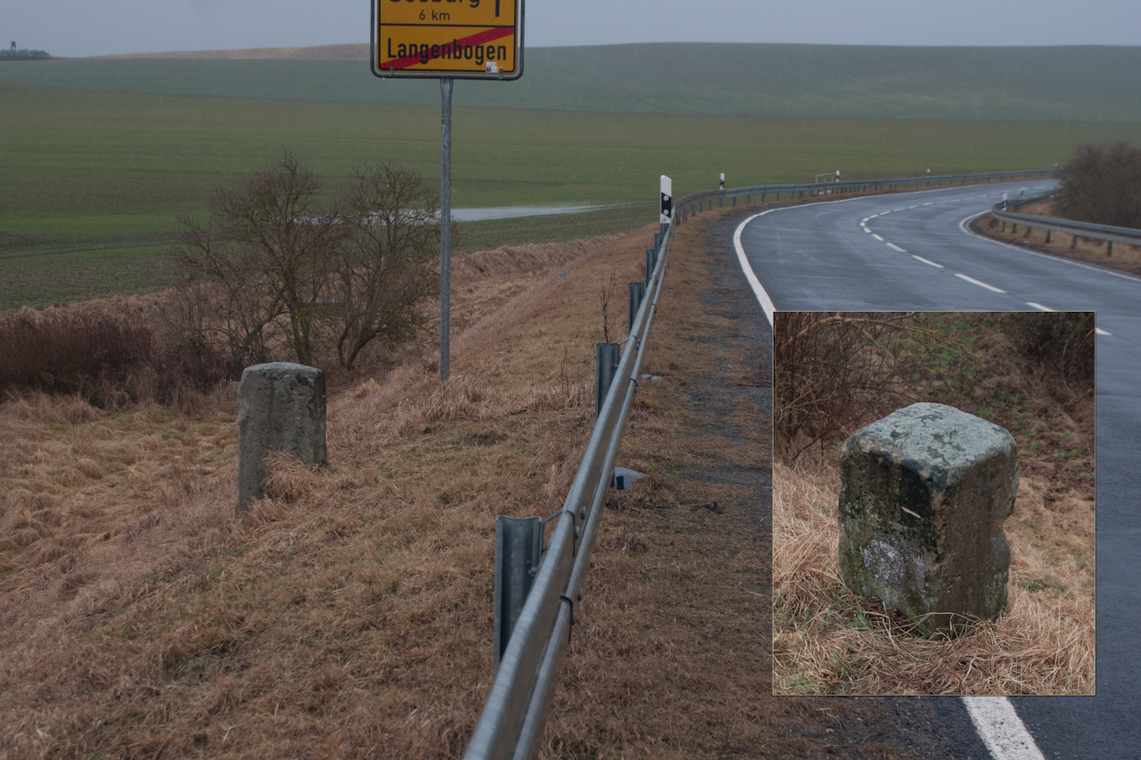 Preußischer Meilenstein am westlichen Ortsausgang von Langenbogen an der ehemaligen Kunststraße Langenbogen - Eisleben.